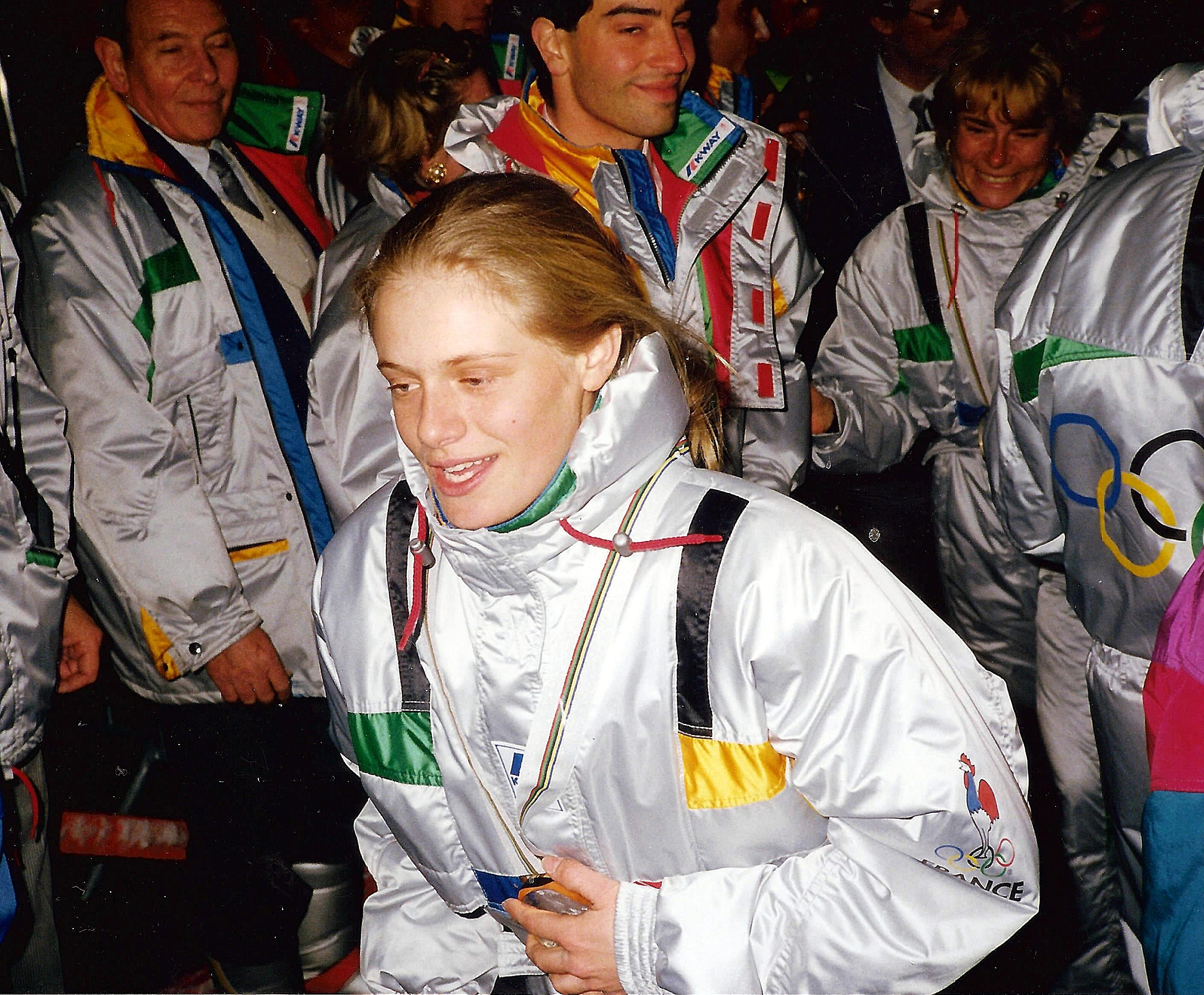 Corinne Niogret lors de la remise des médailles du relais 3×7,5 km.